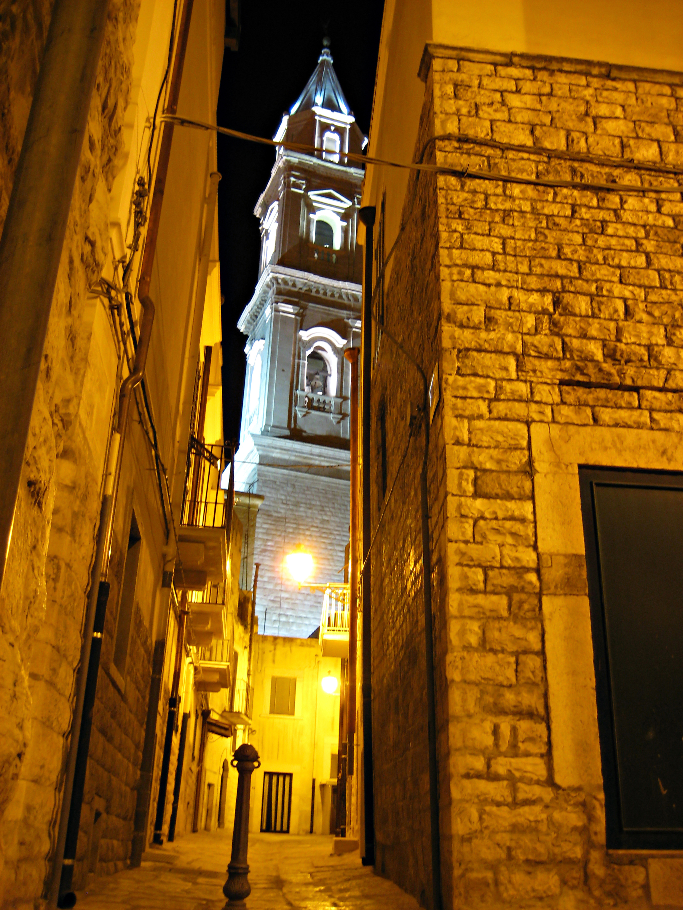 Andria, vista notturna del campanile della chiesa di San Francesco. Forse la foto non rende bene l'idea, ma vi assicuro che dal vivo toglie il fiato. Questa prospettiva l'ho ottenuta poggiando la mia Canon per terra e stendendomi lungo dietro di essa per riuscire a vedere il display.... Magari con un po' di contorsionismo in più avrei ottenuto una prospettiva migliore... XD